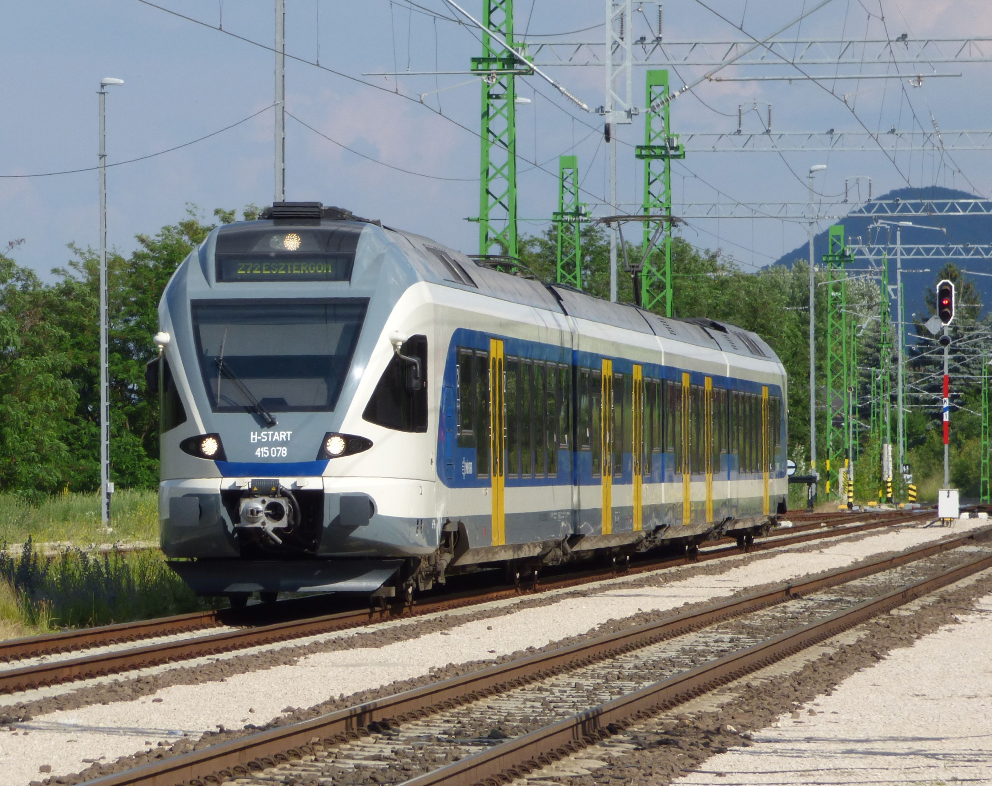 Z72-es zónázó vonat Pilisvörösváron